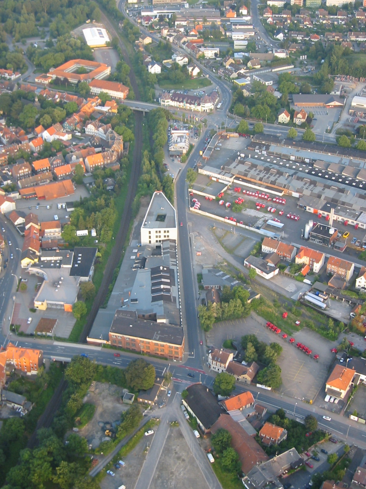 Welger-Werk (rechte Bildhälfte) in Wolfenbüttel in Niedersachsen; Aufnahme aus einem Ballon heraus